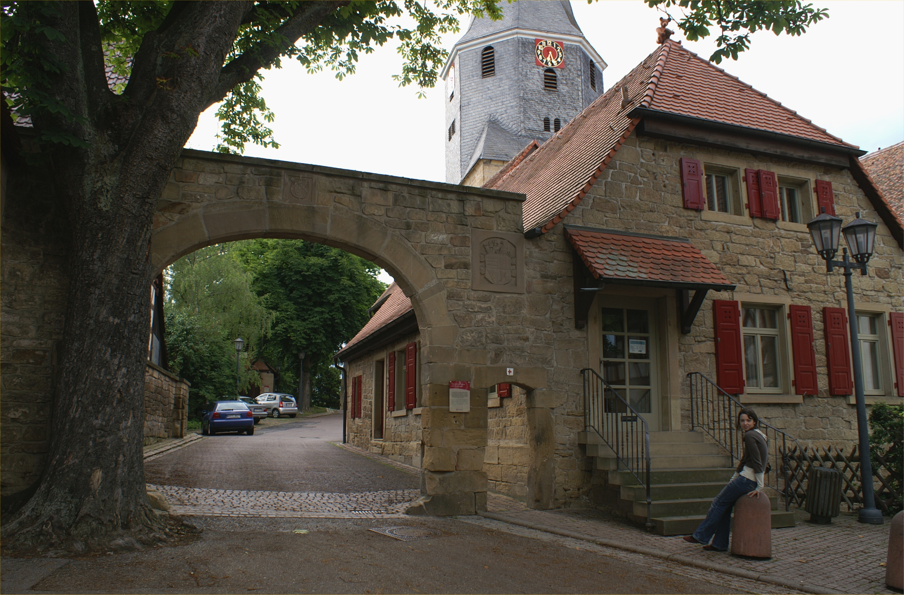 Torwächterhaus. Der Zugang zum Amthof in Oberderdingen erfolgte bis vor 200 Jahren über eine Zugbrücke. Heute ist nur noch das Torwächterhaus und der Torbogen vorhanden, in dessen Mitte sich das herrenalb´sche Wappen befindet.